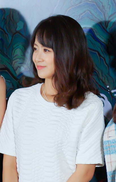 만신 VIP 시사회